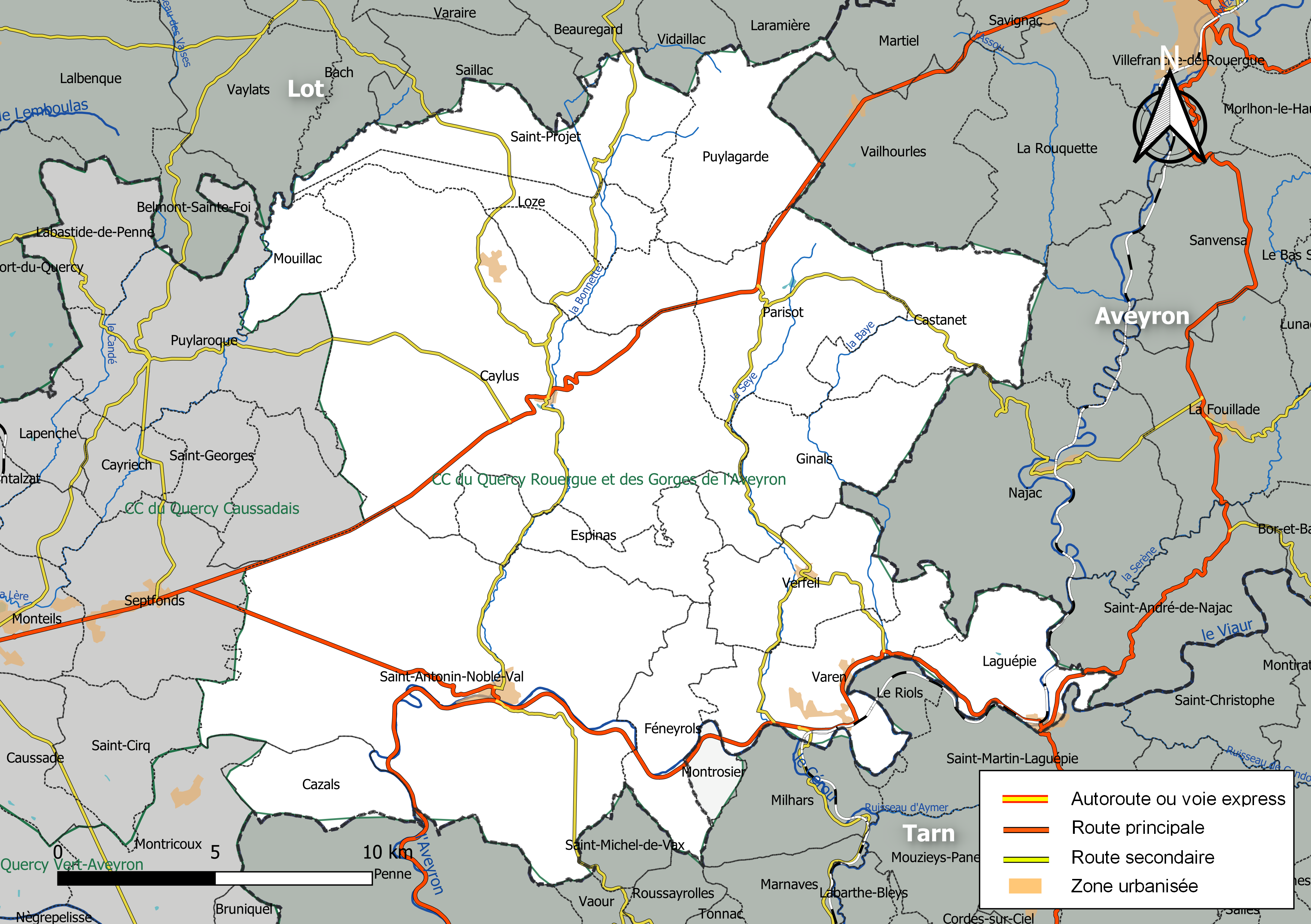 Carte géographique de la Communauté de communes du Quercy Rouergue et des gorges de l'Aveyron, département de Tarn-et-Garonne, France. Composition au 1er janvier 2019.